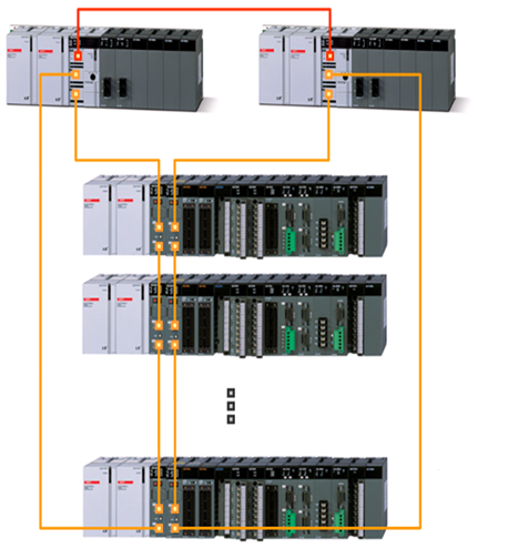 RAPIEnet을_이용한_시스템구성도